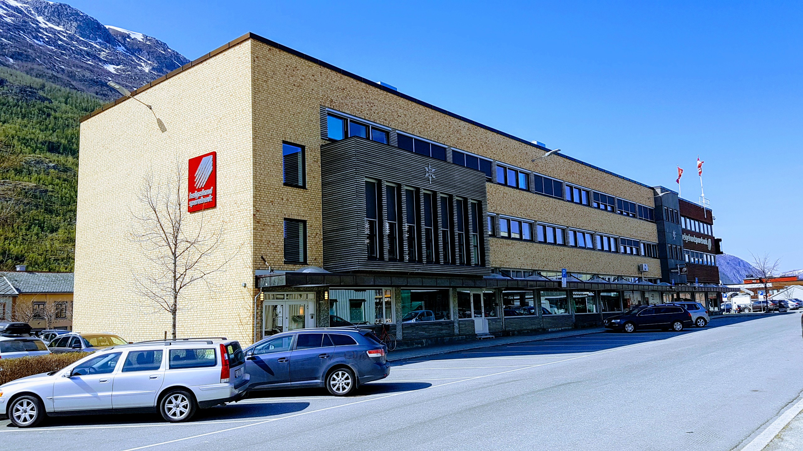 Helgeland Sparebanks kontor i Mosjøen etter oppussing av fasaden våren 2018